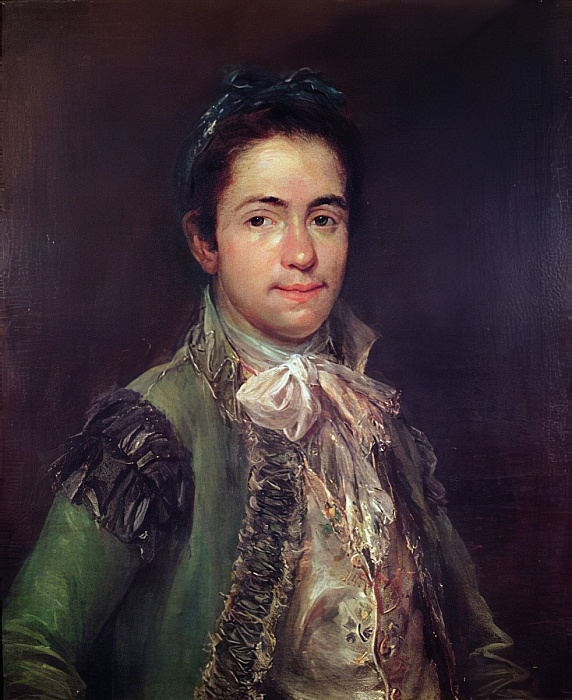 Retrato del torero español Joaquín Rodríguez, (1743-1800), más conocido como Costillares.